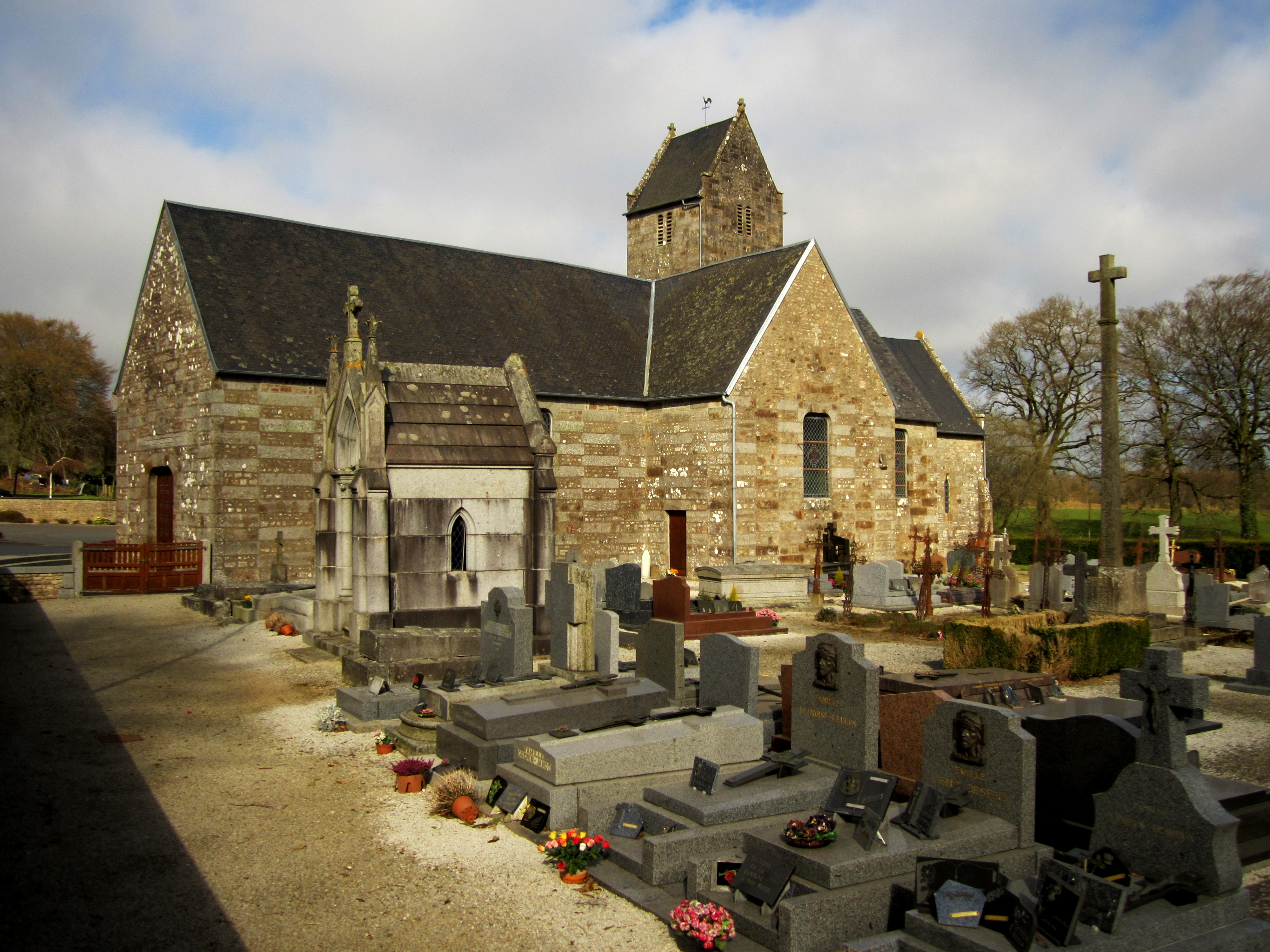 Braffais, Manche